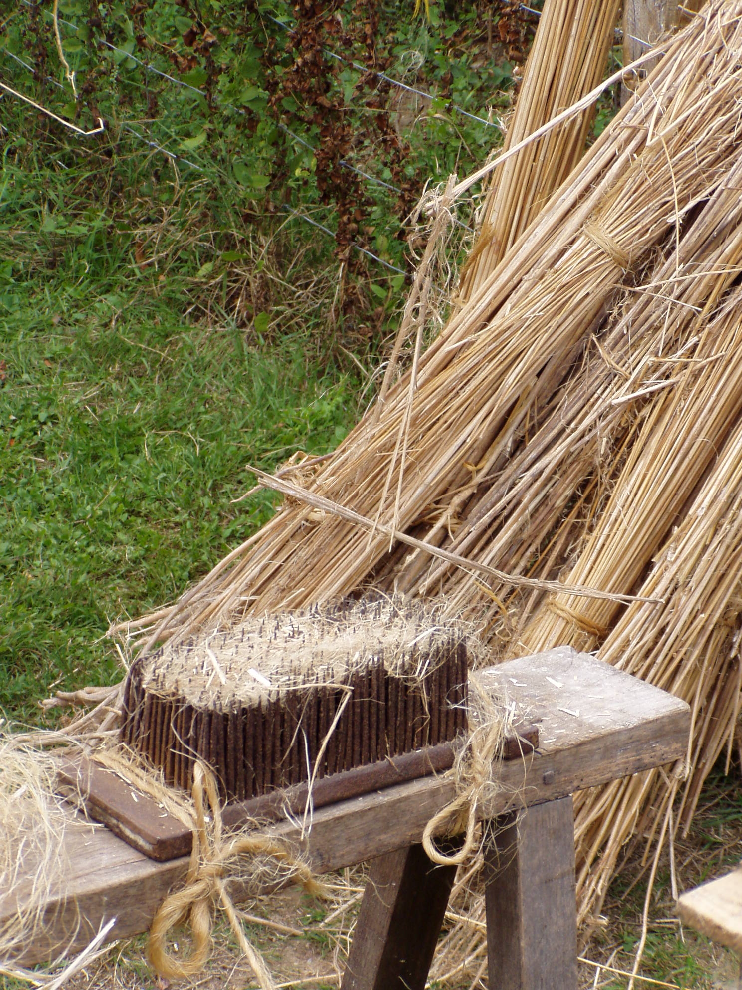 Peigne à démêler le chanvre (photo prise dans le Cher en août 2006).